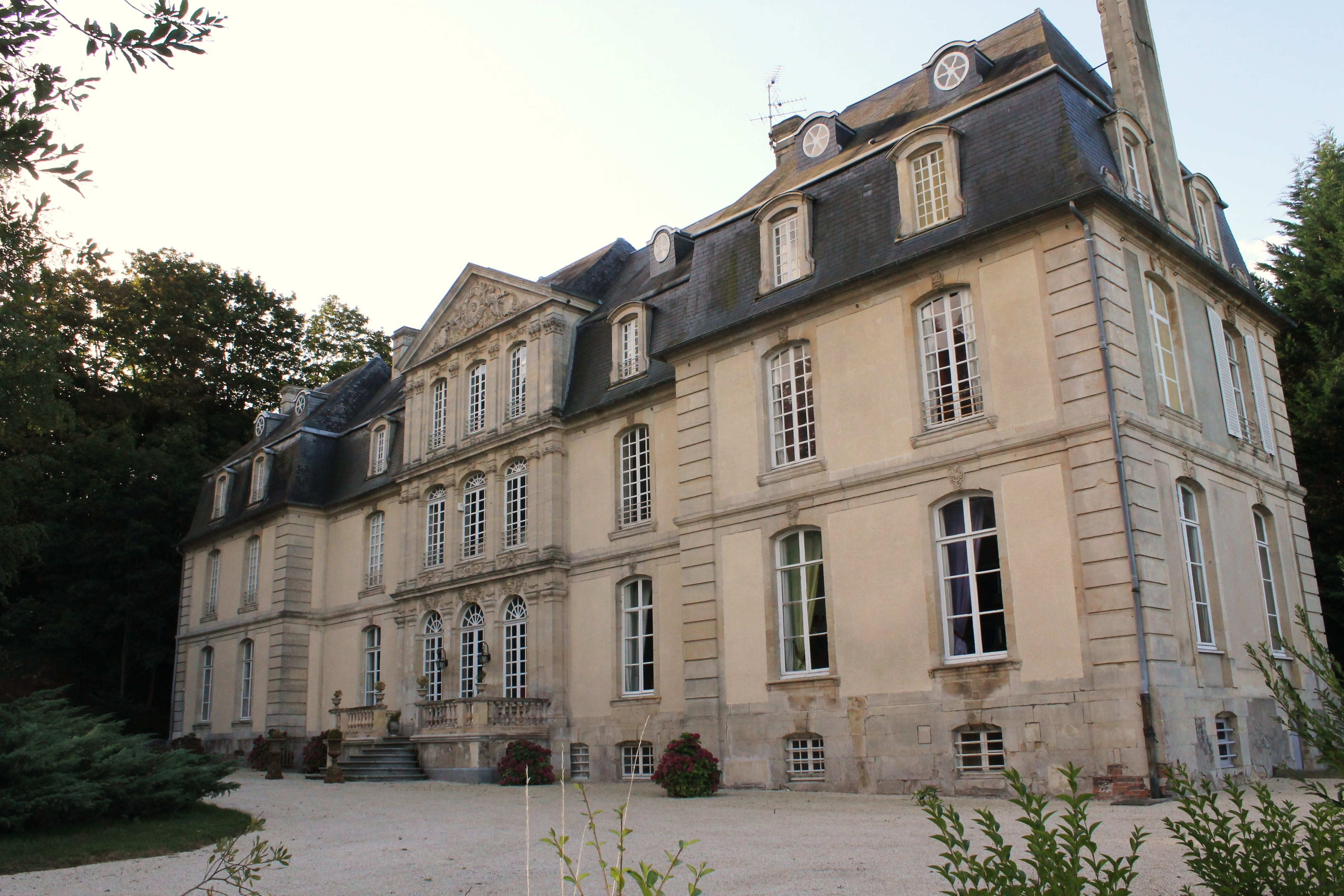 Château de Coupigny à Airan (Calvados)